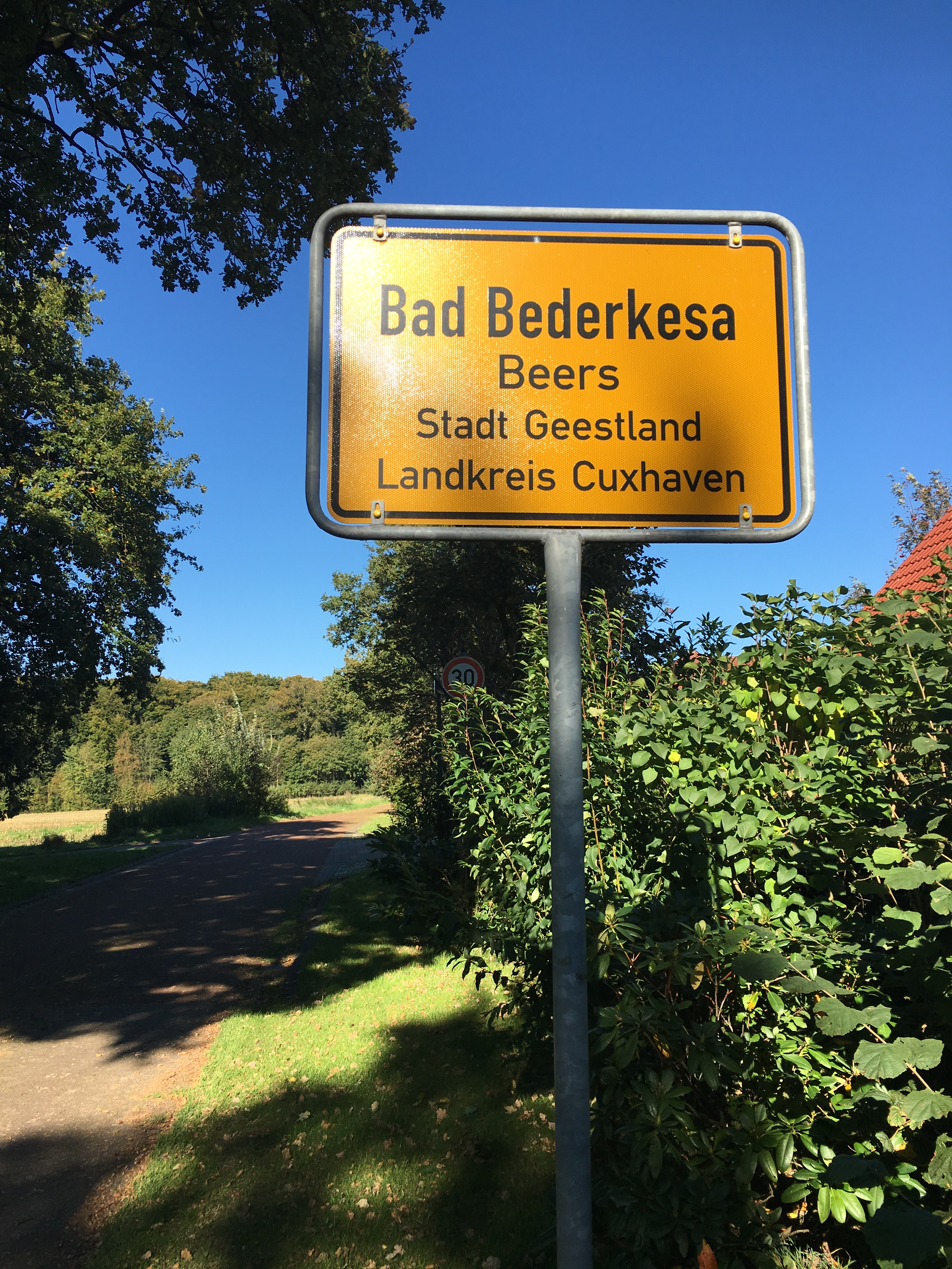 Oortsschild von Beers mit’n plattdüütschen Naam mit op